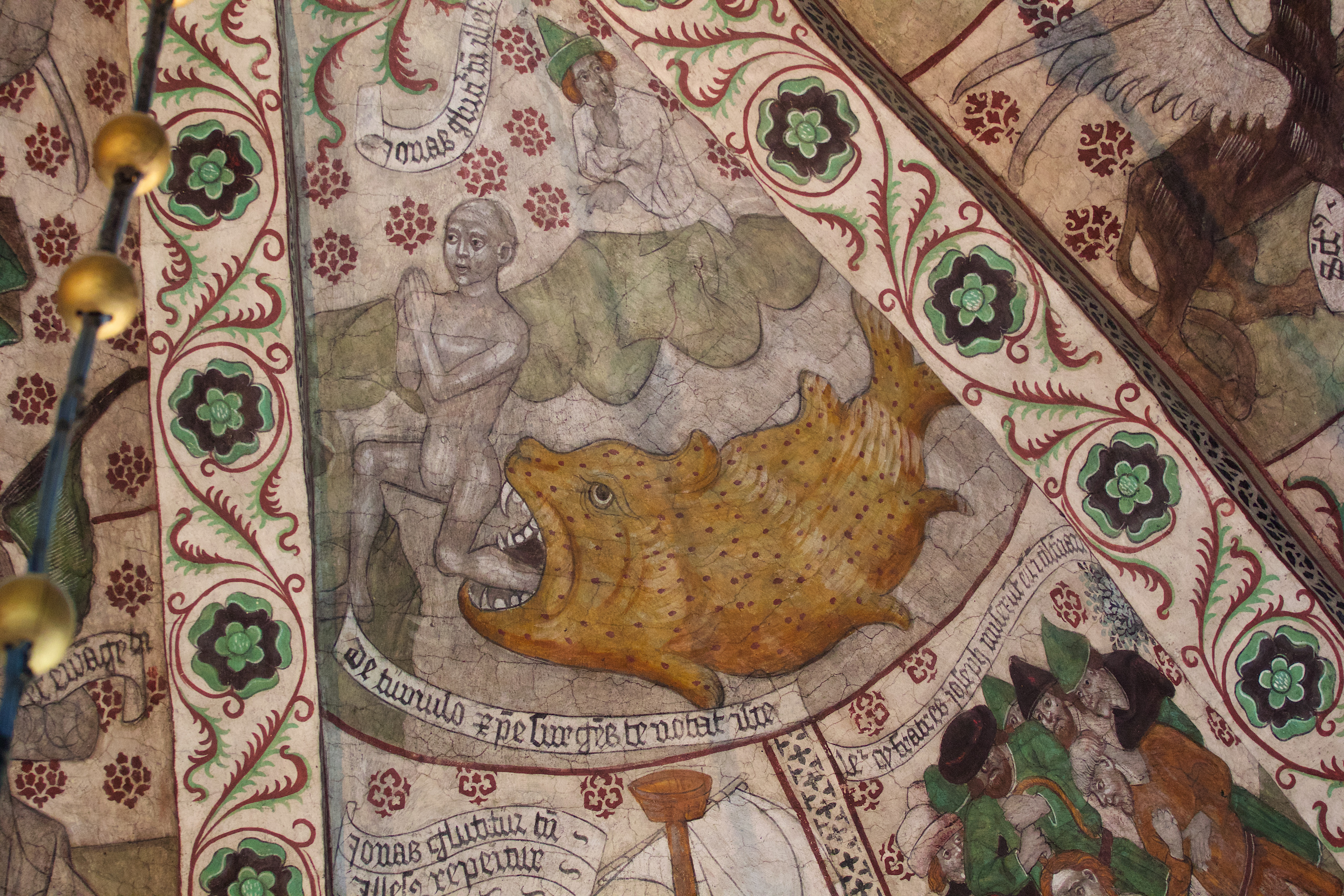 Täby kyrka (Täby Kyrkby 3:12)